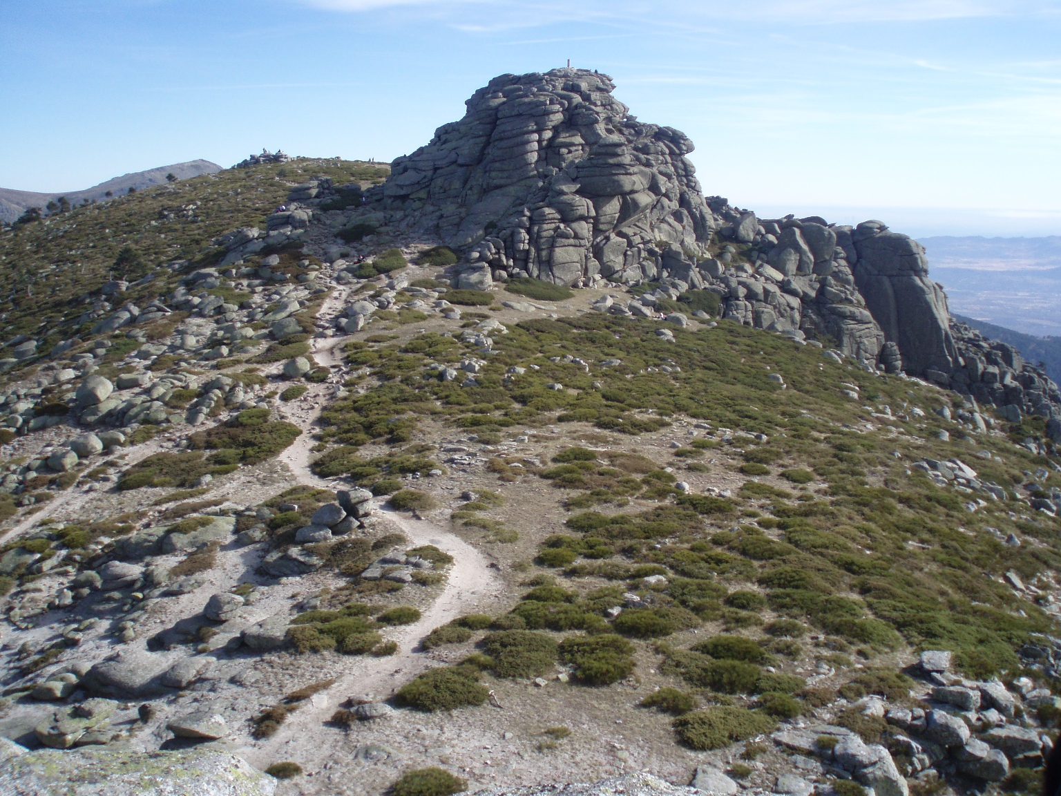 Primer pico de Siete Picos (Sierra de Guadarrama, España) visto desde la cima del segundo.